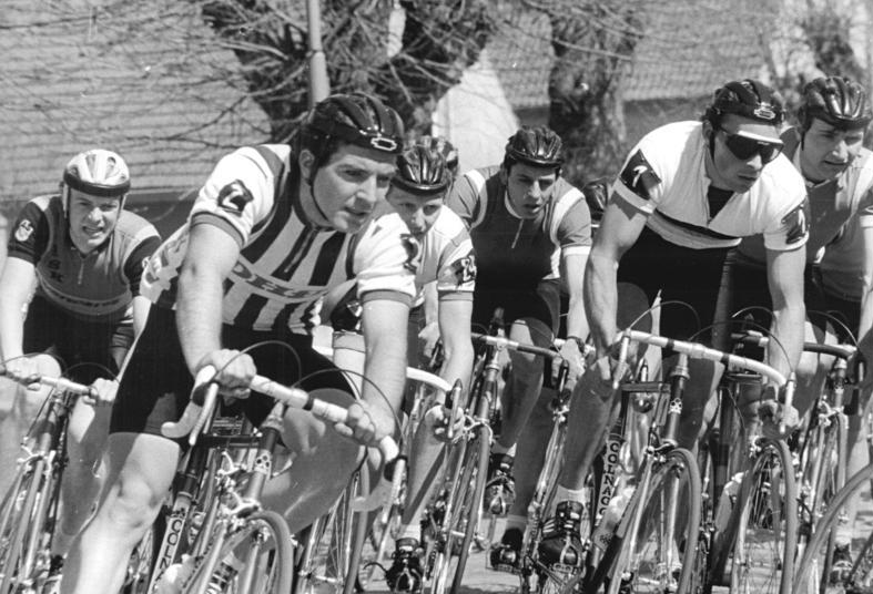 Bert Dietz, Cedric Güthe, Uwe Ampler ADN-ZB Oberst 17.4.88 Bez. Cottbus: Zum Frühjahrsrennen der Straßenradsportler Rund um Görlsdorf gingen 103 Fahrer auf die 145 km lange Strecke, die in zehn Runden absolviert wurde. Bereits unmittelbar nach dem Start zerriß das Feld, hier Bert Dietz (Nr. 2), DHfK Leipzig, Cedric Güthe (Nr. 24), TSC Berlin, und Friedensfahrtsieger Uwe Ampler (Nr. 1), DHfK Leipzig. Abgebildete Personen: Ampler, Uwe: Radrennfahrer, DDR Dietz, Bert: Radsportler, SC Deutsche Hochschule für Körperkultur und Sport (DHfK) Leipzig, Friedensfahrt 1990, DDR